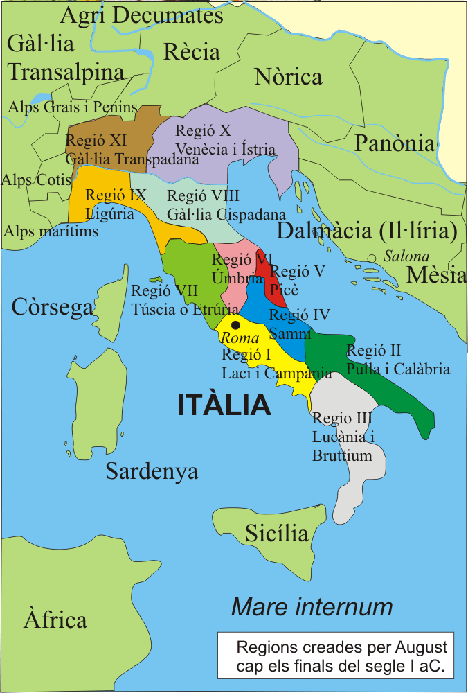 Regions d'Itàlia en temps d'August